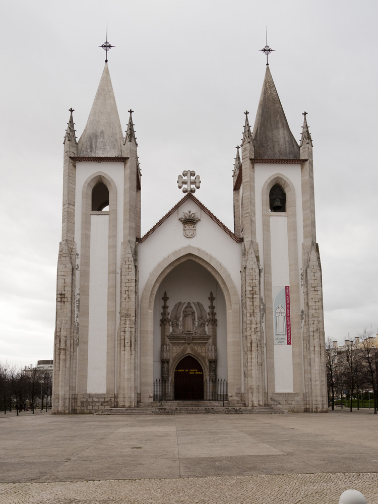 Igreja do Santo Condestável, Campo de Ourique, Lisboa; Arq. Vasco Regaleira